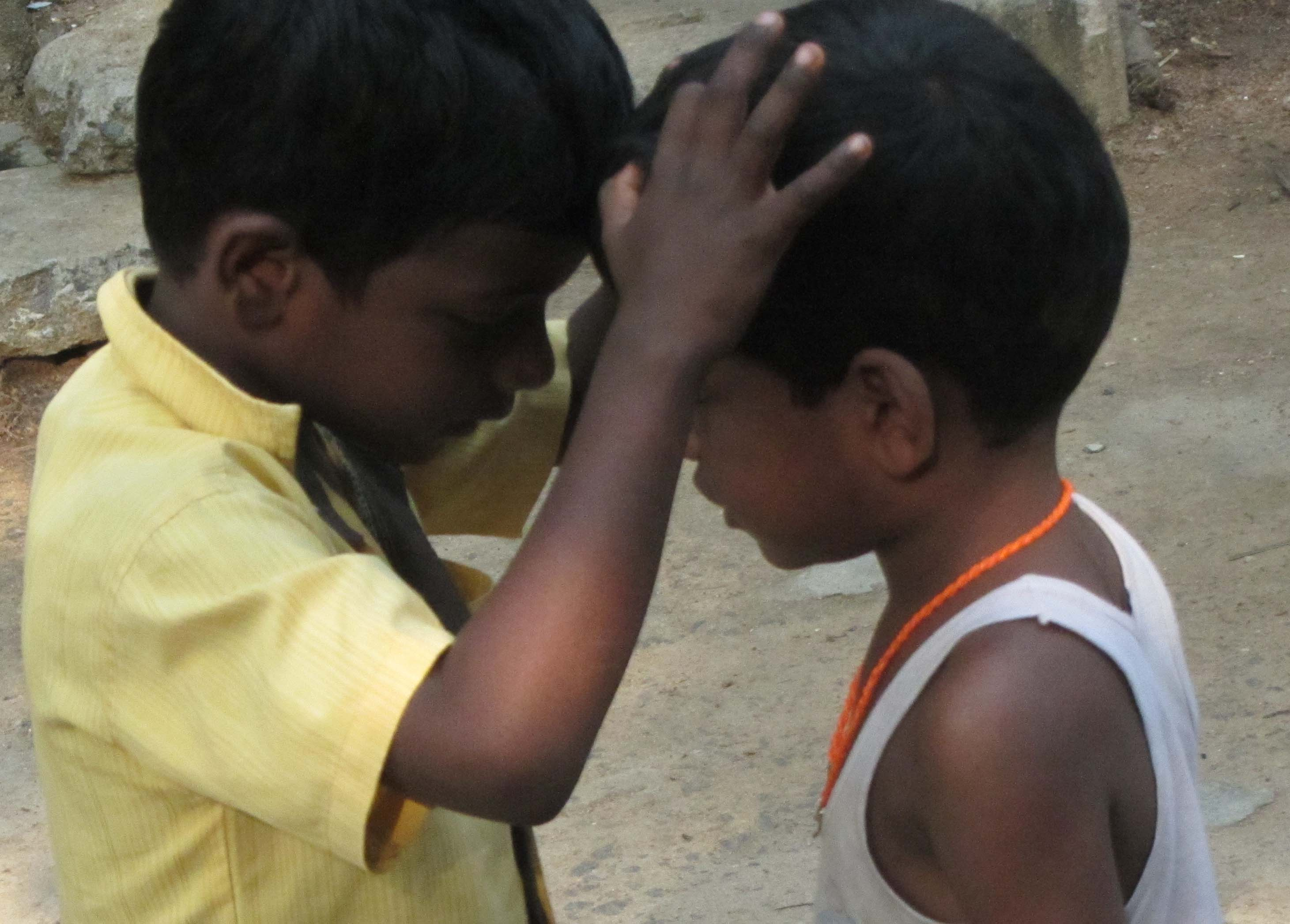 தோட்டம் விளையாட்டில் விளைச்சல் முற்றியதா எனப் பார்ப்பதாகத் தலையில் முட்டுதல். own shot.